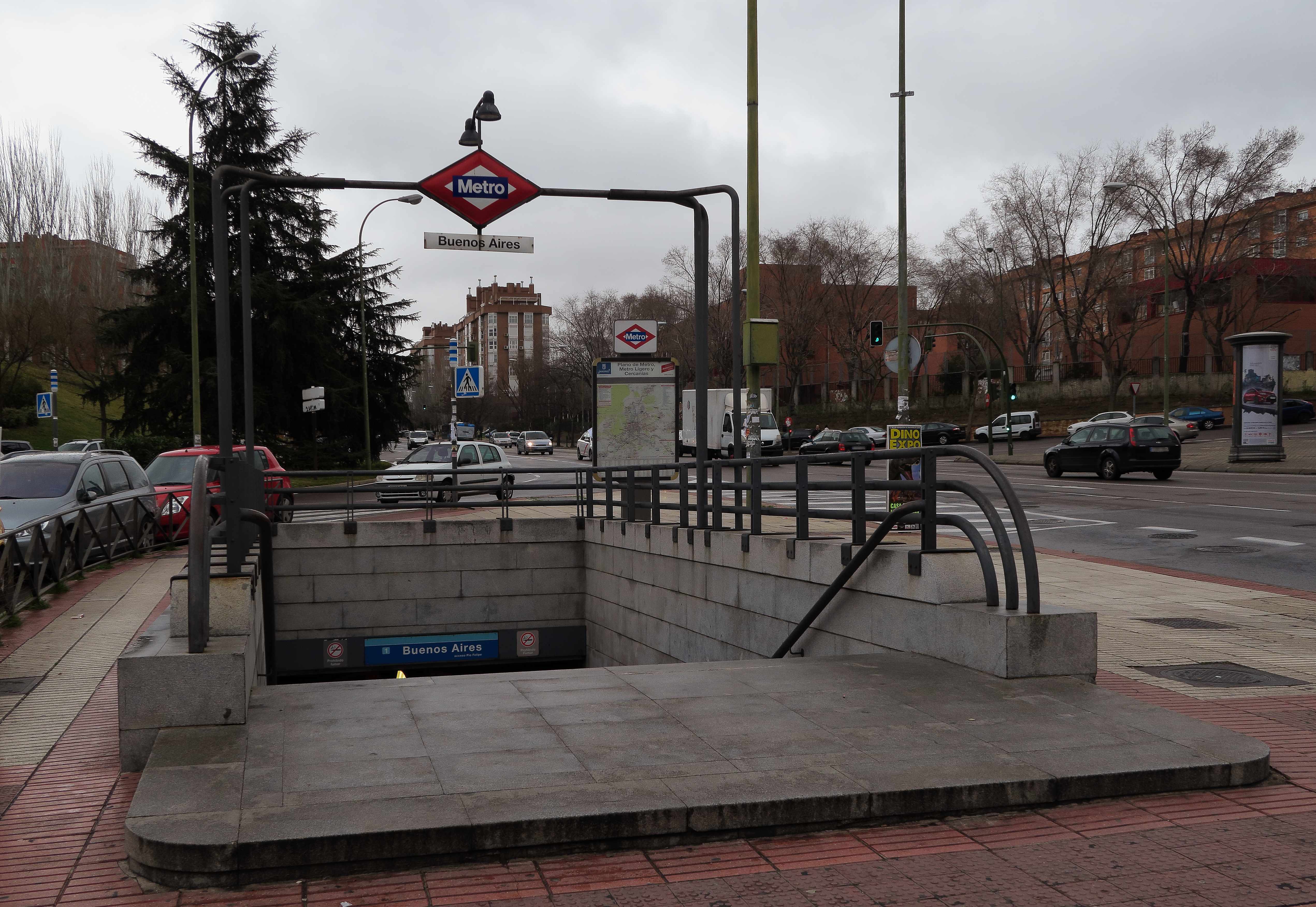 Estación de Buenos Aires (Metro de Madrid)